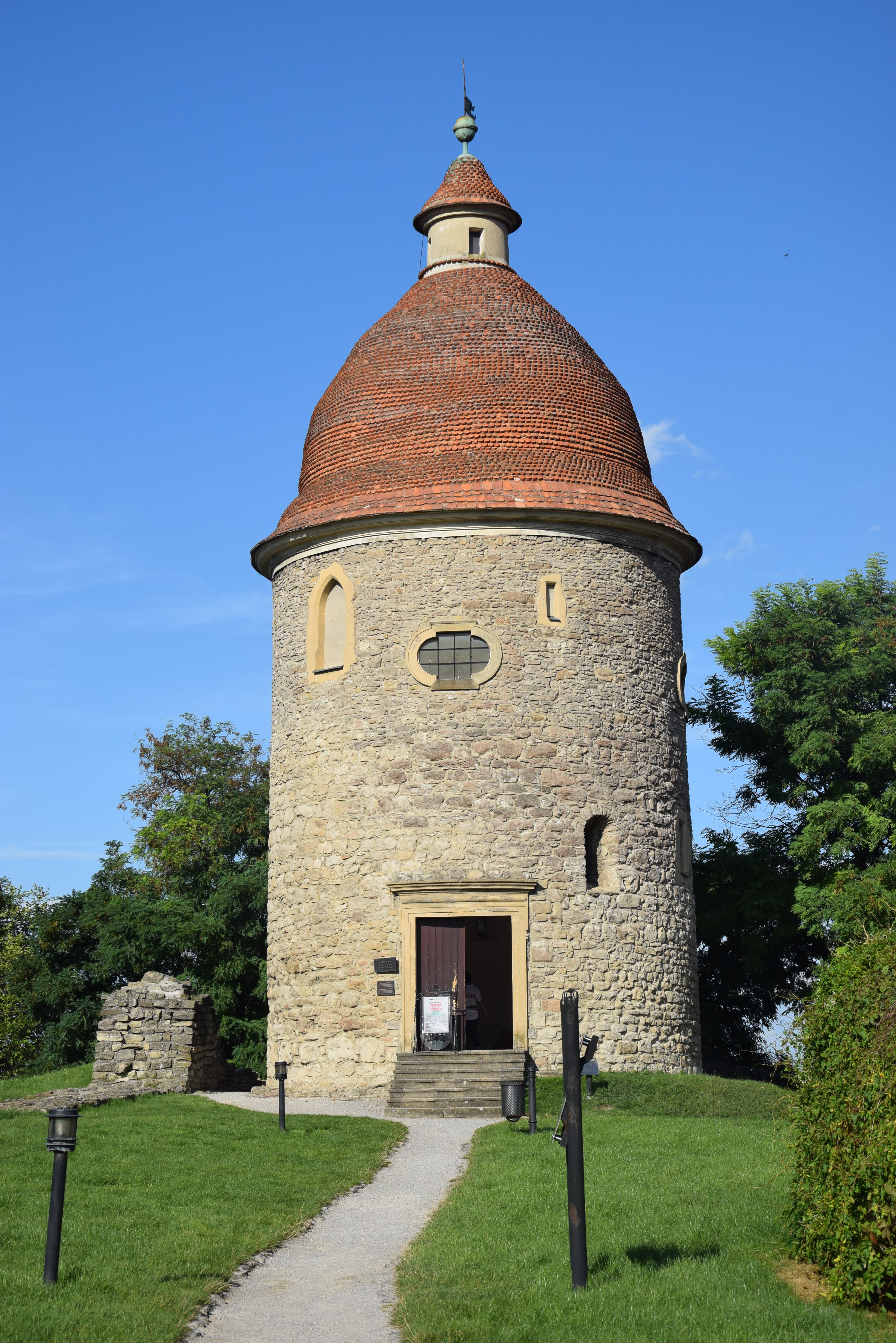 Rotunda v Skalici